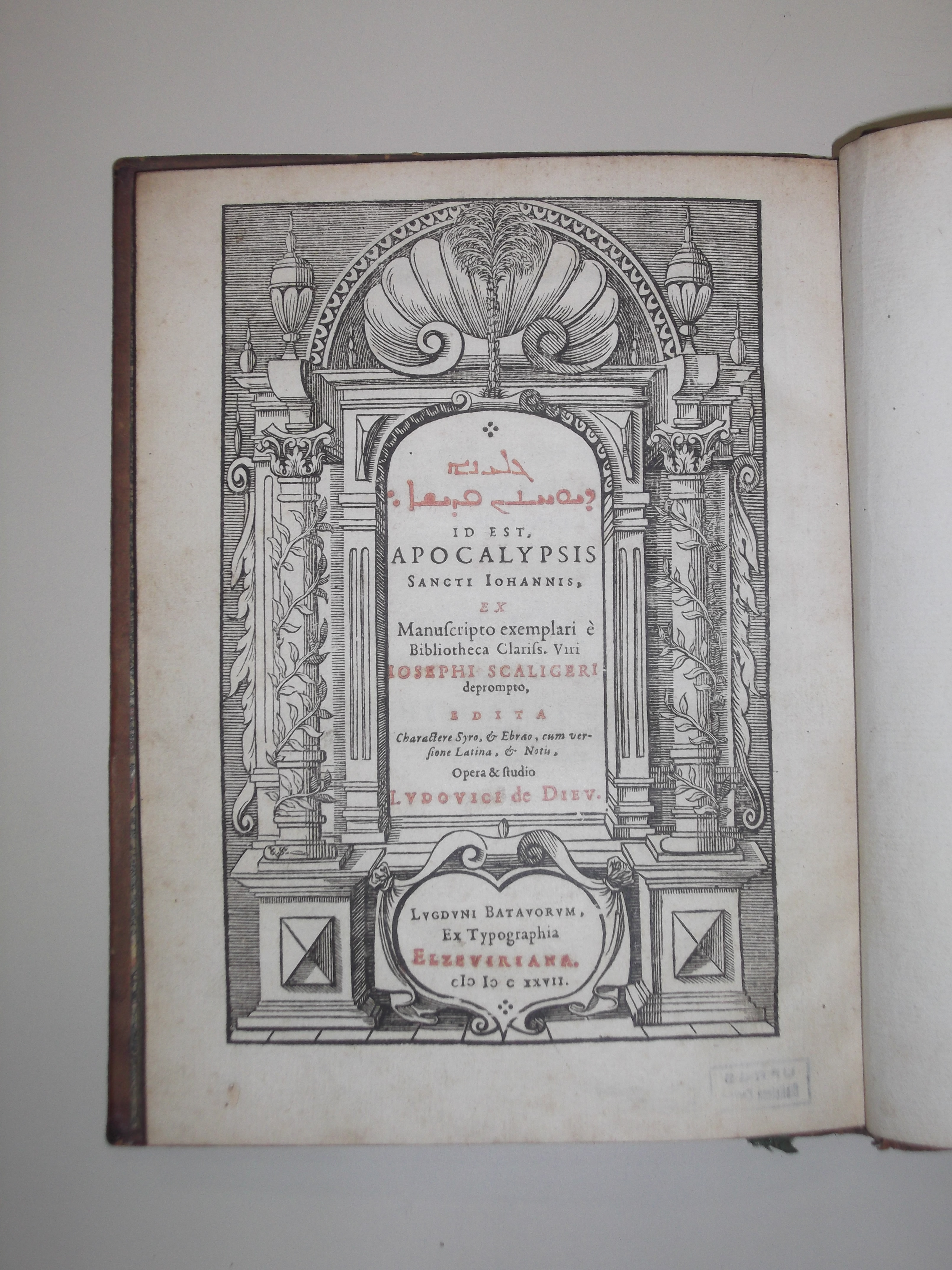 BÍBLIA. N.T. Apocalípse. Poliglota. Gelyānā ude-Yoḥanan qaddīsha, id est, Apocalypsis Sancti Iohannis . Lugduni Batavorum : Ex Typ. Elzeviriana, 1627.